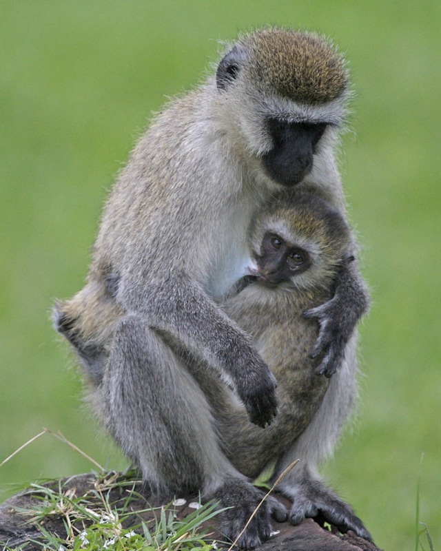 Vervet Monkey, or just Vervet Chlorocebus pygerythrus August 2008 Lake Nakuru, Kenya 690V2354